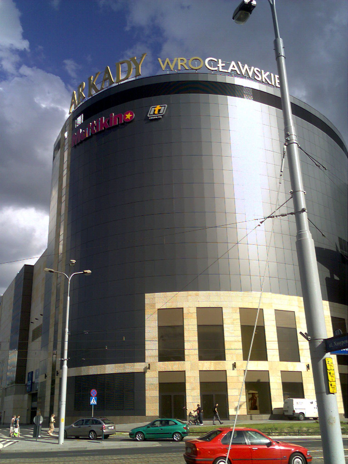 Arkady Wrocławskie - czerwiec 2007